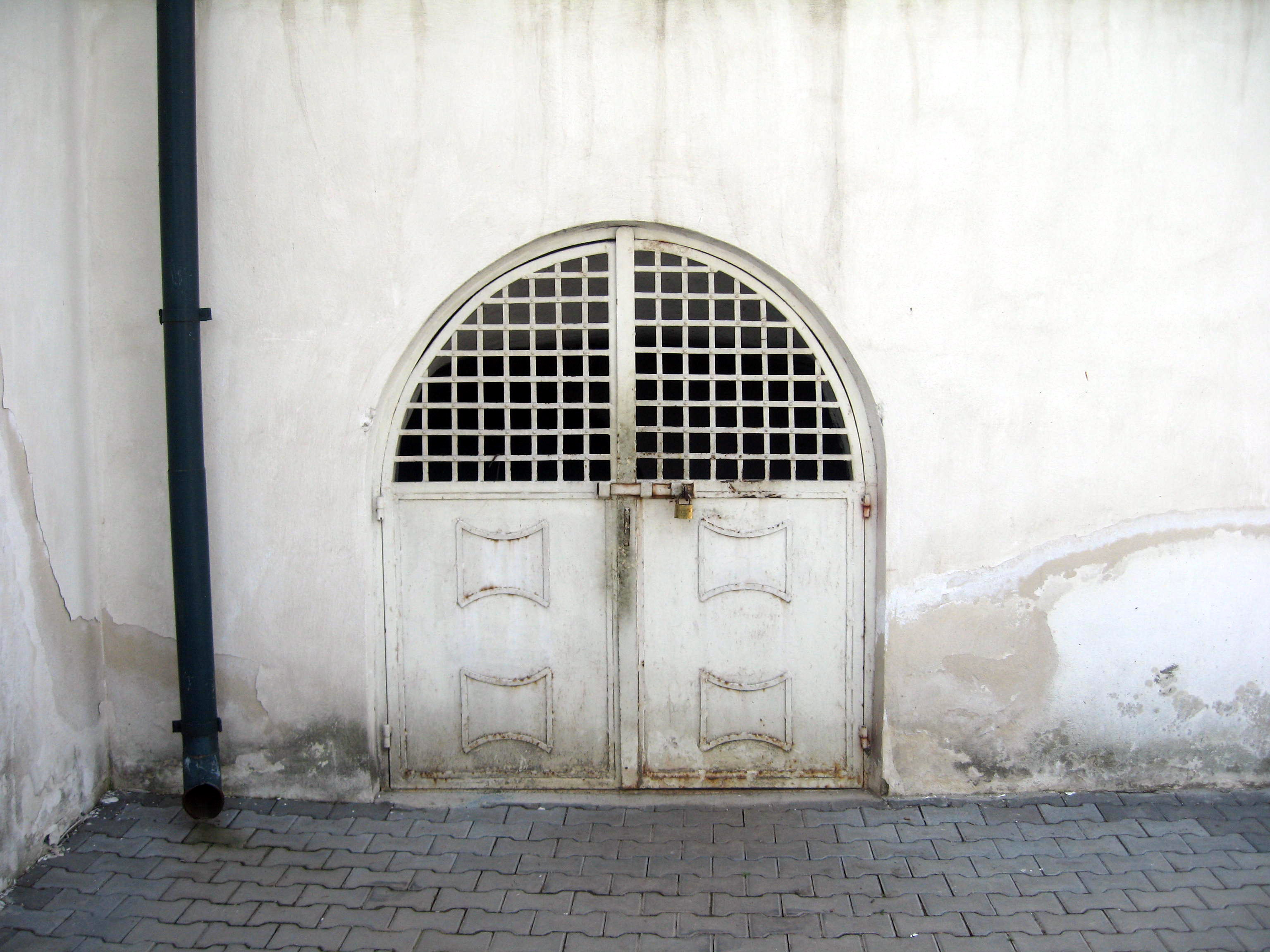 Catedrala episcopală din Huși 03